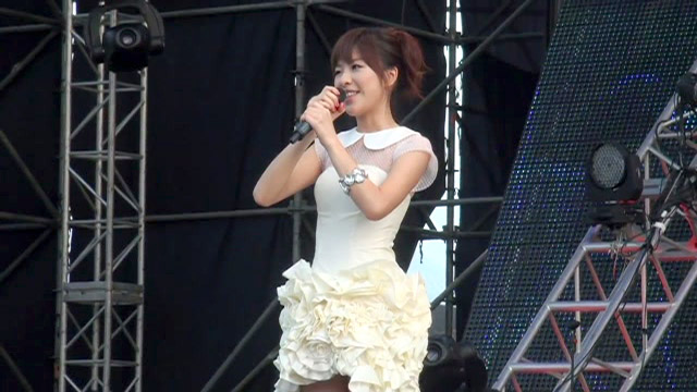 關詩敏在義大超級亞洲音樂節